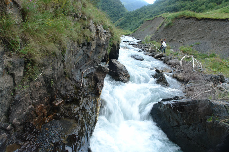 Georgia, Khevsureti